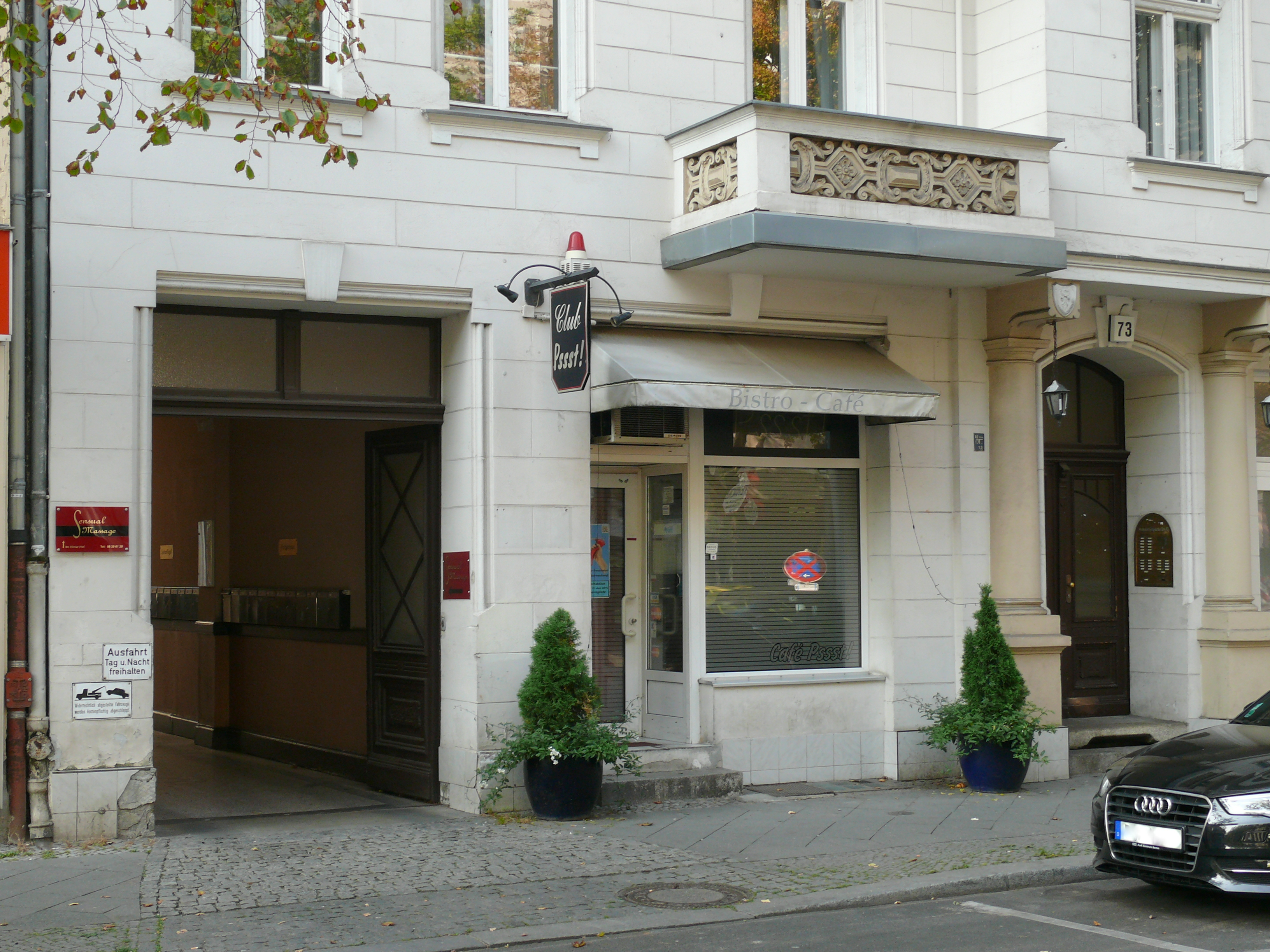 Berlin-Wilmersdorf Brandenburgische Straße Café Pssst!